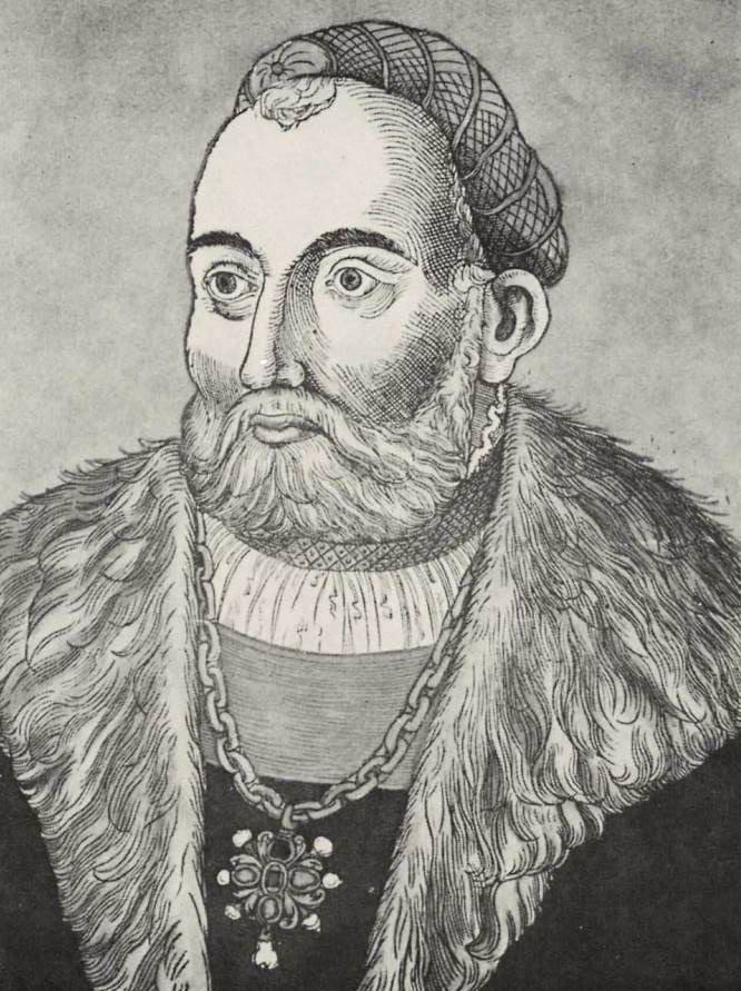 Szapolyai János fametszet